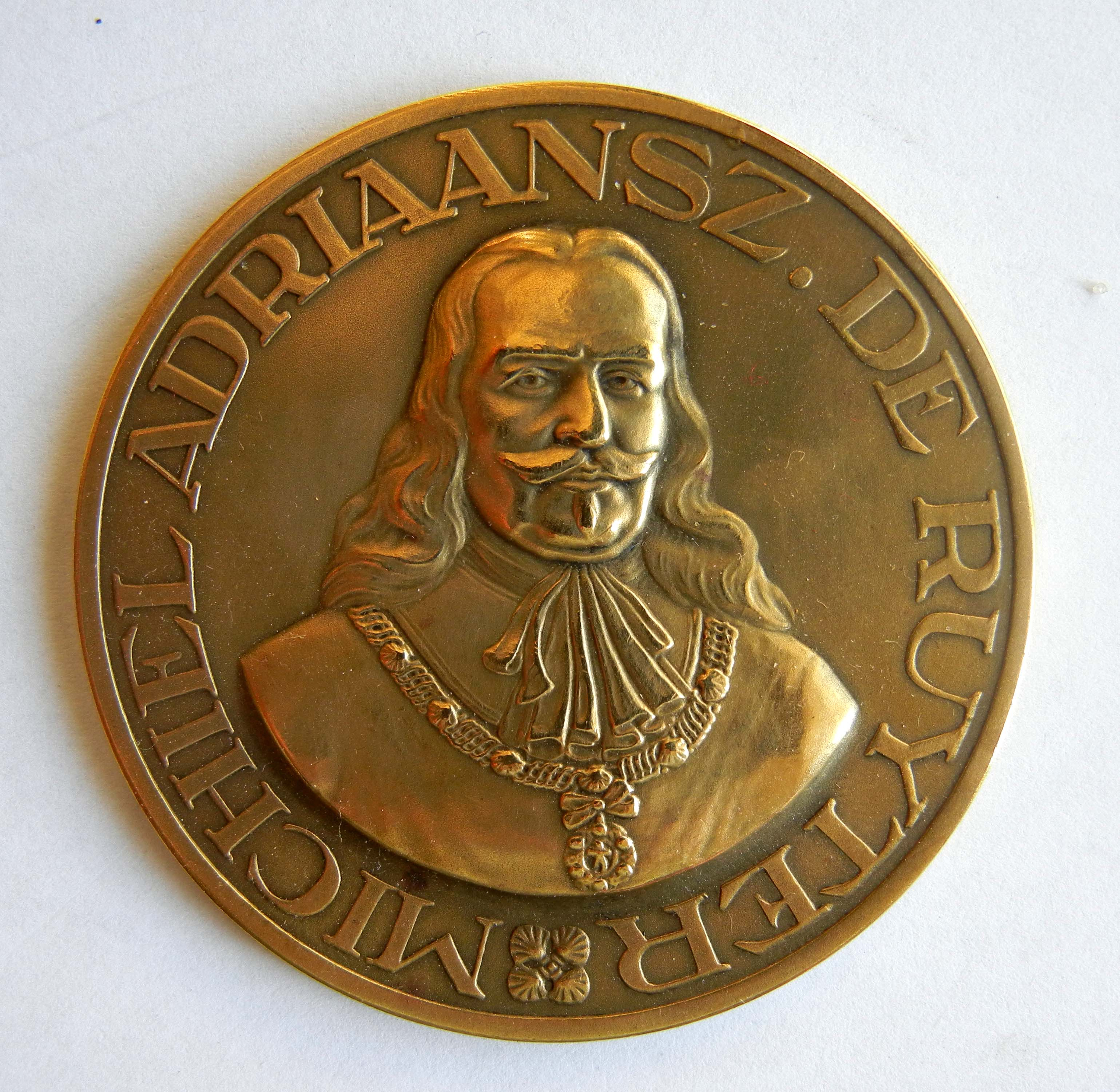 Médaille MICHIEL ADRIAANSZ. DE RUYTER 250e anniversaire (1676-1926) de la mort de l'amiral néerlandais Michiel de Ruyter (1607-1676) Graveur inconnu en bronze Diamètre 60 mm Poids 68 grs